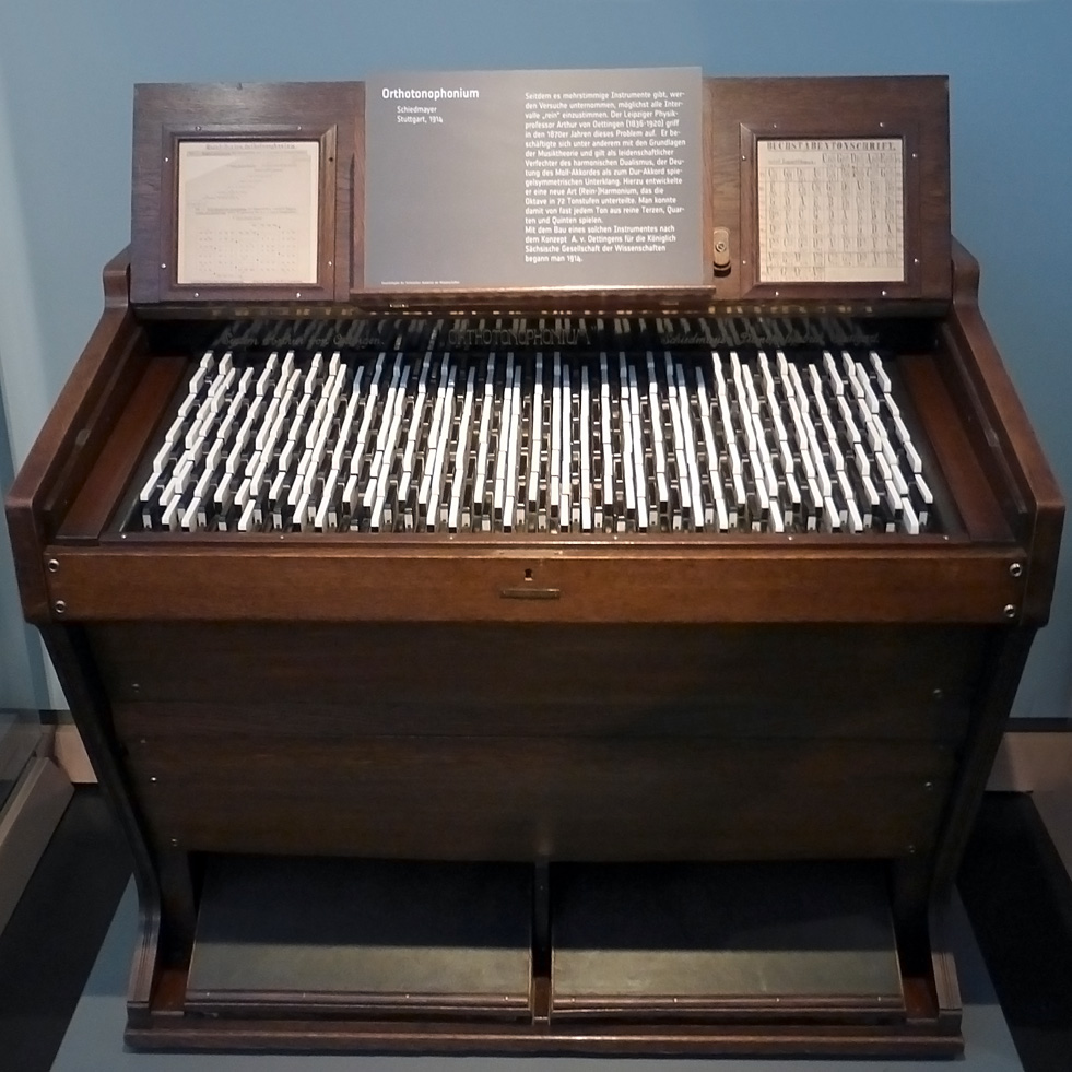 Orthotonophonim im Museum für Musikinstrumente der Universität Leipzig